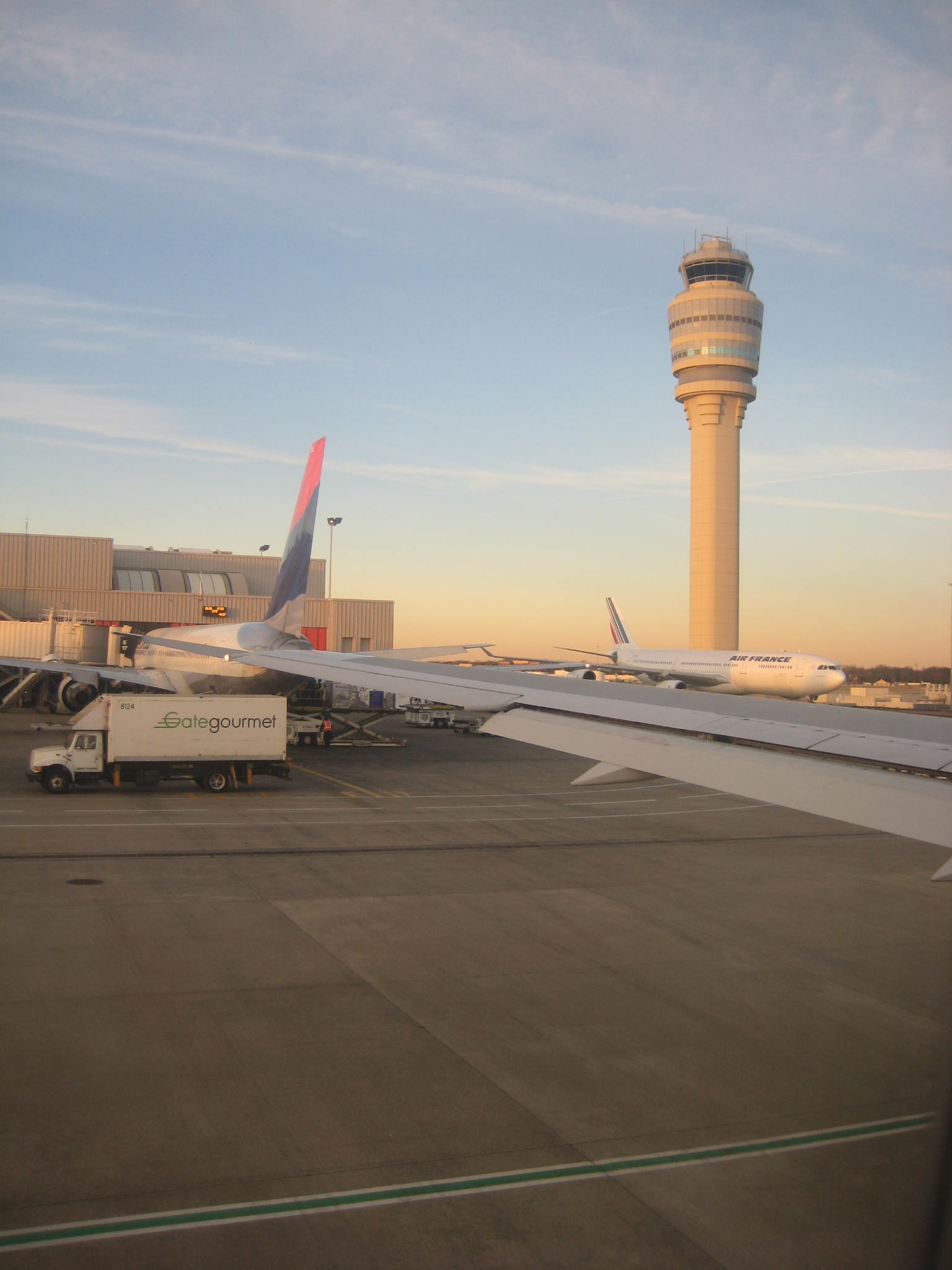 Atlanta airport